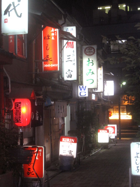 辰巳新道の看板